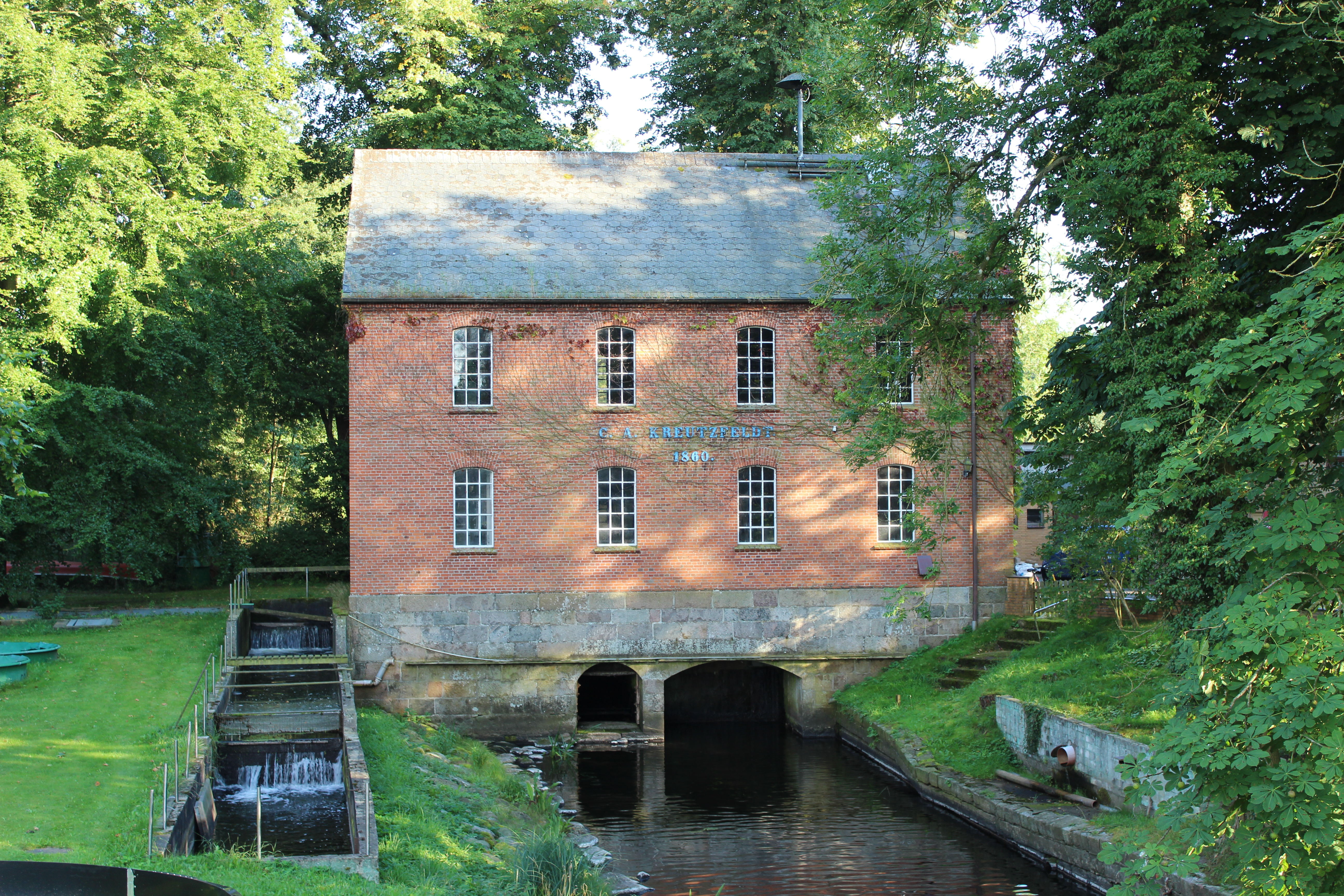 Schleswig-Holstein, Warder, Ortsteil Altmühlendorf, Hauptstrasse, Wassermühle mit Ablauf (Granitquadereinfassung)